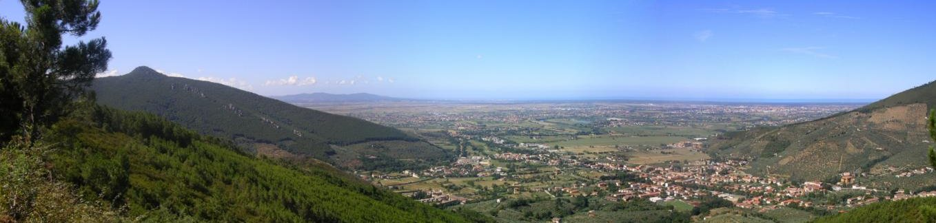 Panorama from Monti Pisani on Pisa's valley